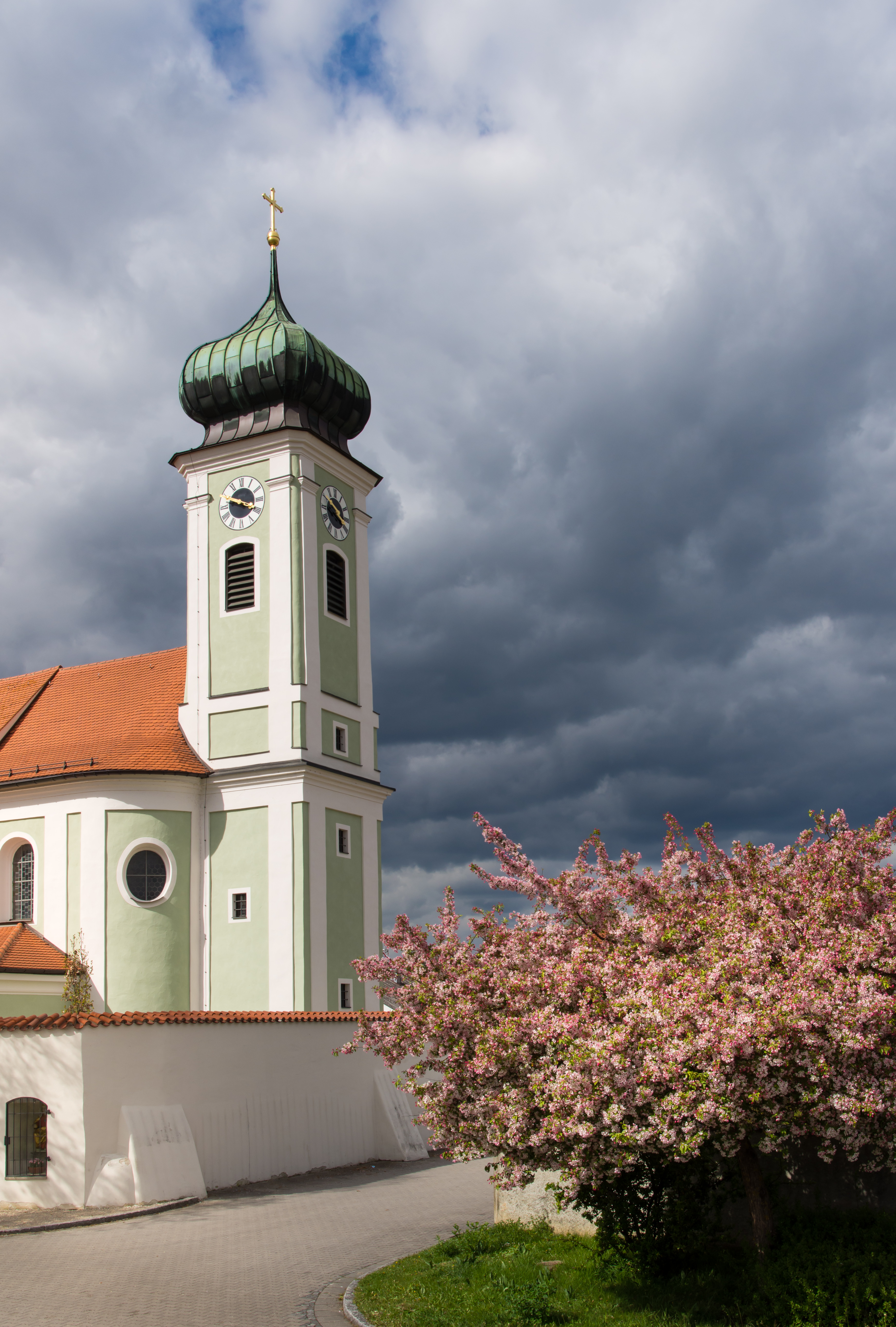 Kirche St. Georg Schwablweis